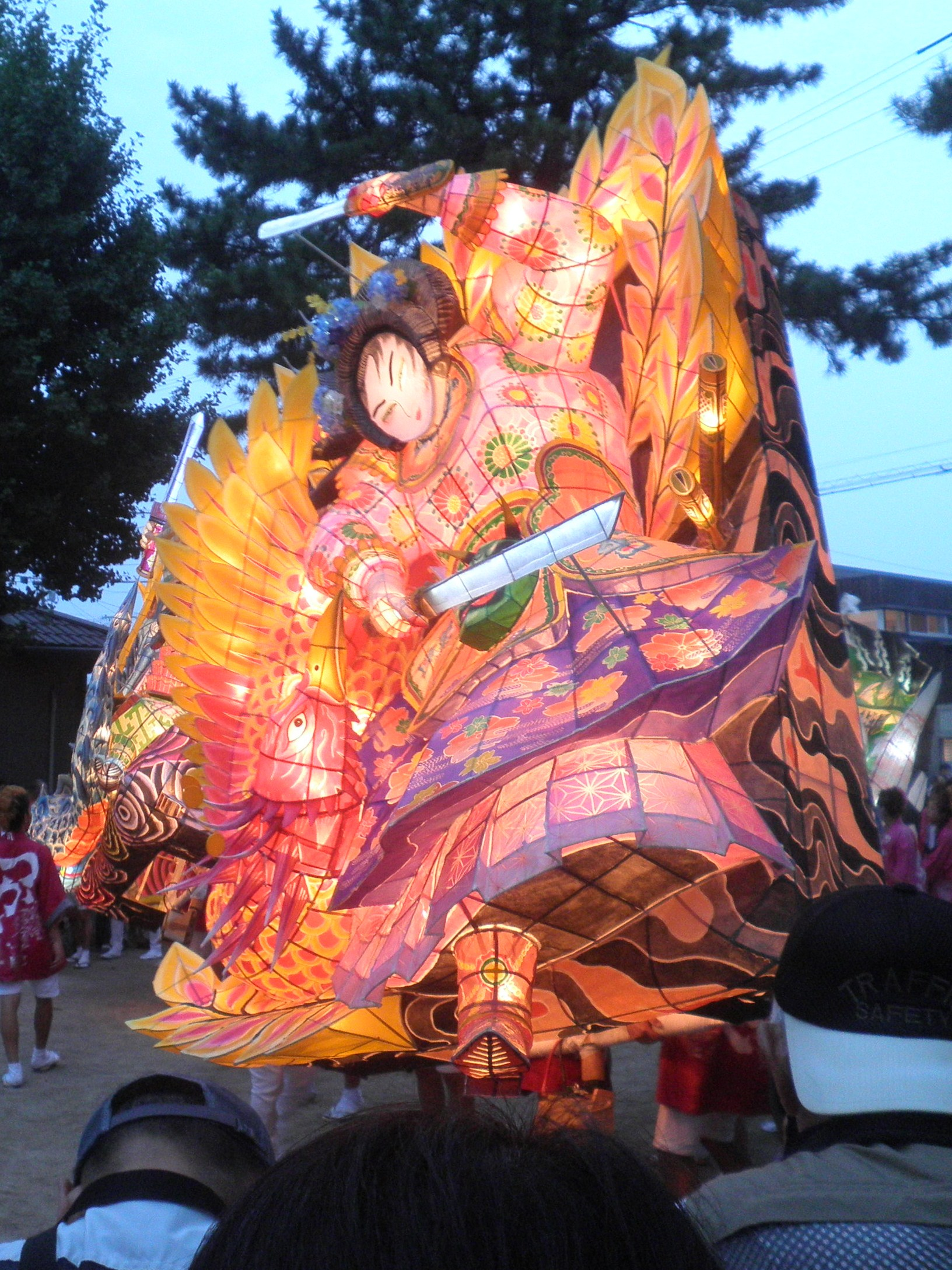 愛知県の無形民俗文化財に指定されている刈谷市の万燈祭り 2013年7月28日(日)の「本楽」における「司町」の万燈 辺りが暗くなって万燈に灯がともり、秋葉社の境内で舞を奉納している様子